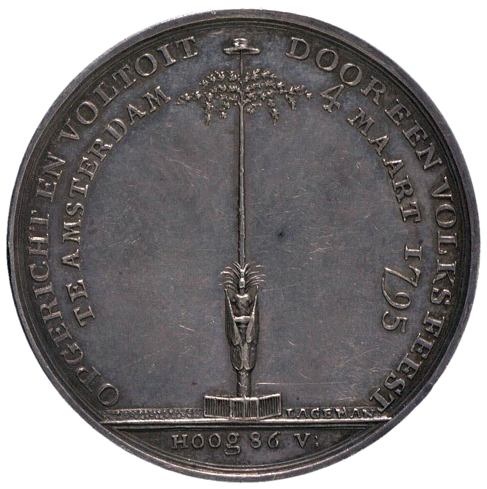 Herdenkingspenning 19 januari 1795, omwenteling te Amsterdam en het planten van de vrijheidsboom, 4 maart 1795 te Amsterdam